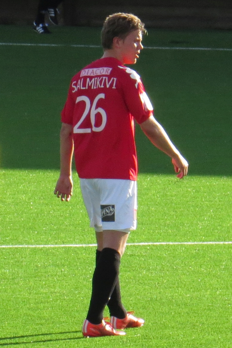 Ville Salmikivi, suomalainen jalkapalloilija HIFK:n joukkueessa kaudella 2015.